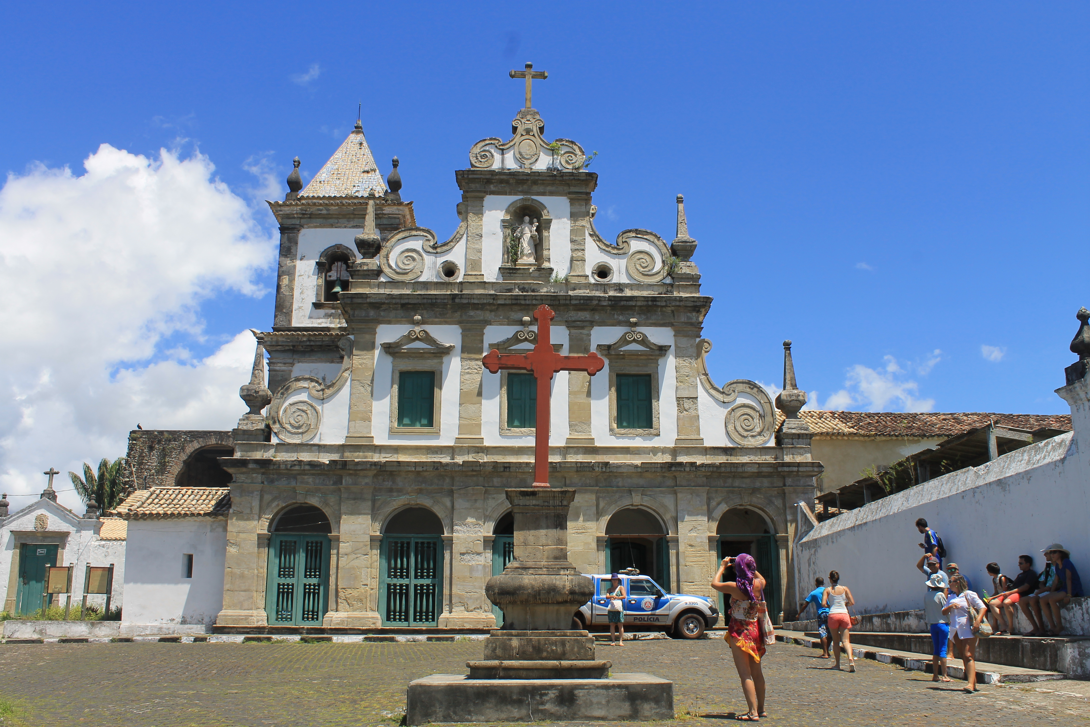 Convento e Igreja de Santo Antônio